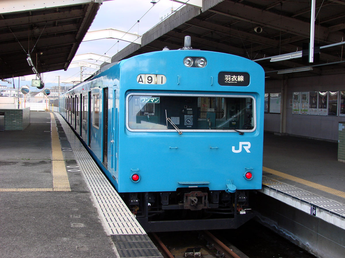 JR西日本 日根野電車区103系（東羽衣）